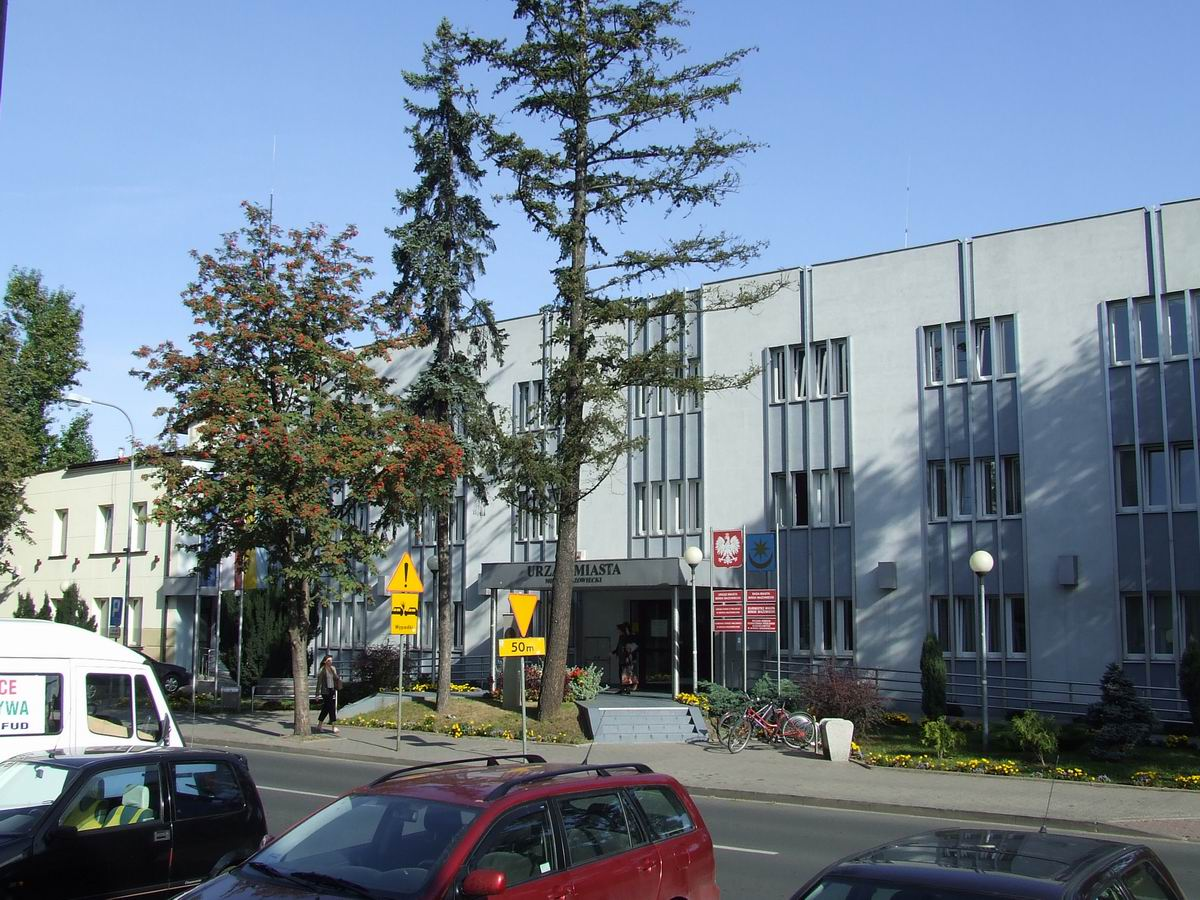 Mińsk Mazowiecki, Urząd Miasta